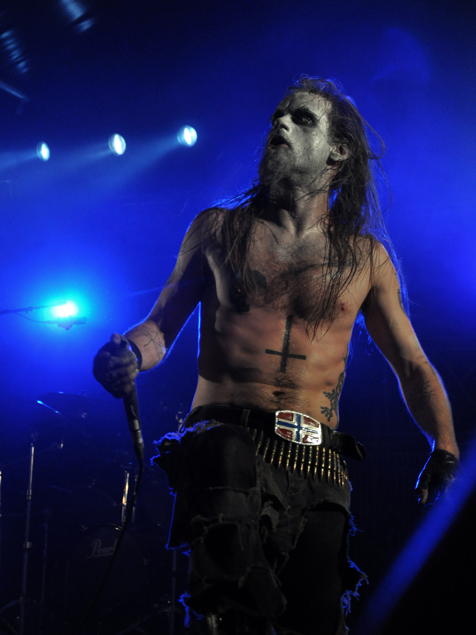 Taake au Metal Méan Festival, le 22 Août 2009: Hoest.